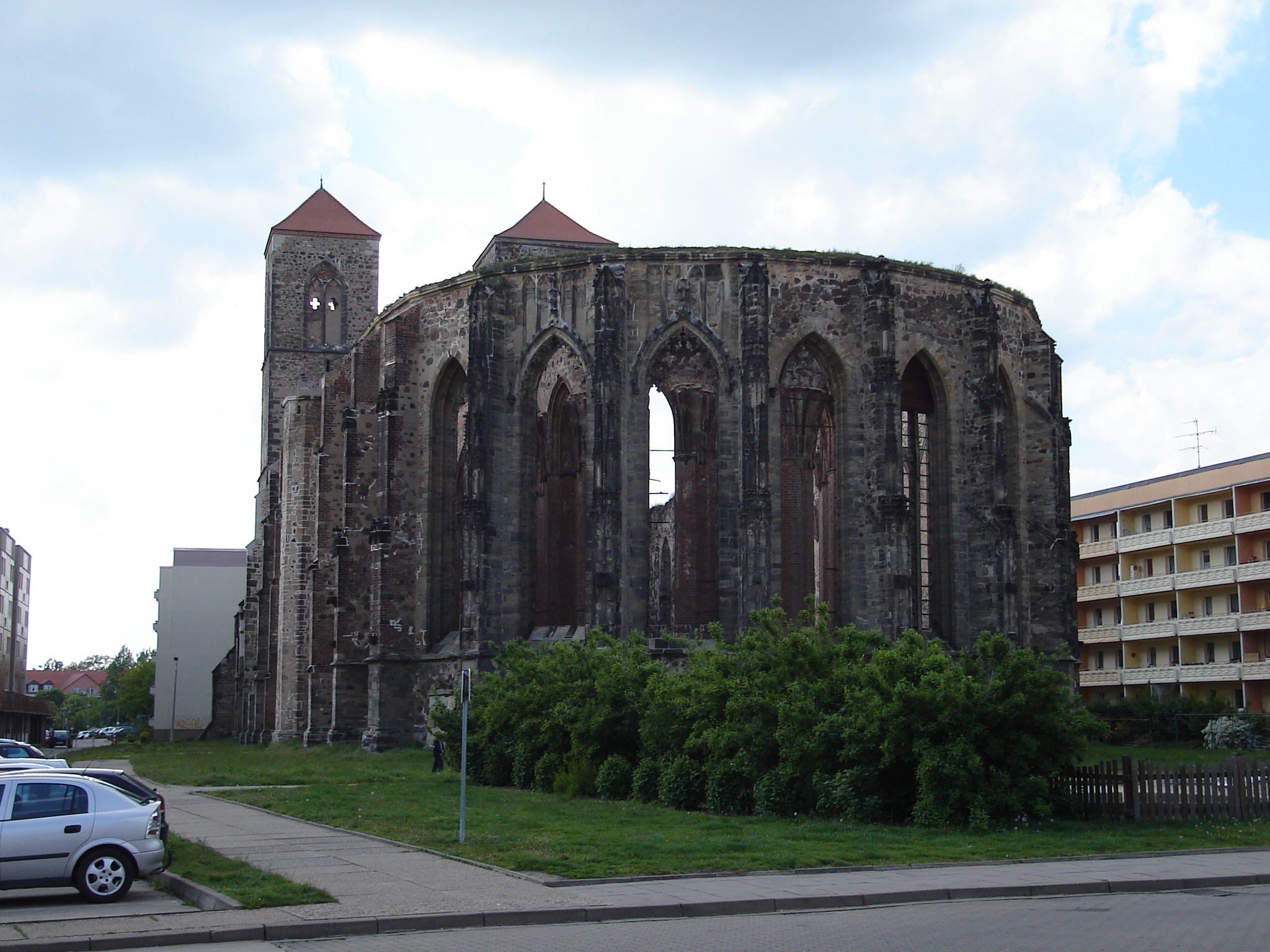 Zerbst, Kirchenruine St. Nikolai